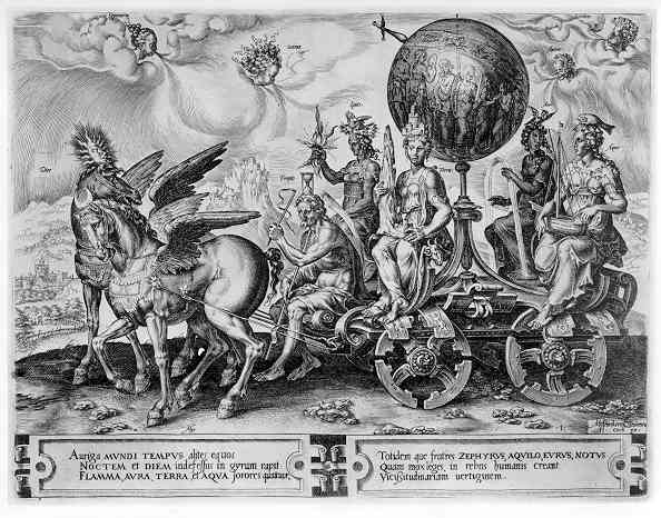 Triumphwagen der Welt (Allegorie), nach: Die Triumphe nach Petrarca (Monde)